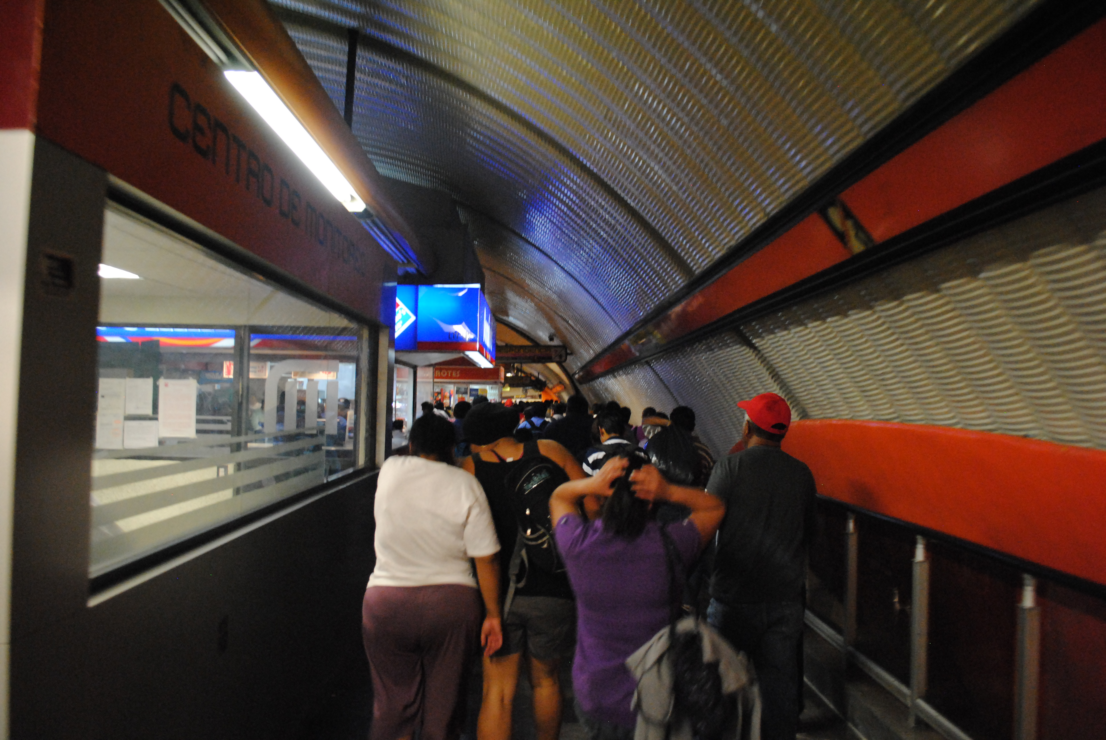 Túnel que interconecta las líneas 1, 7 y 9.